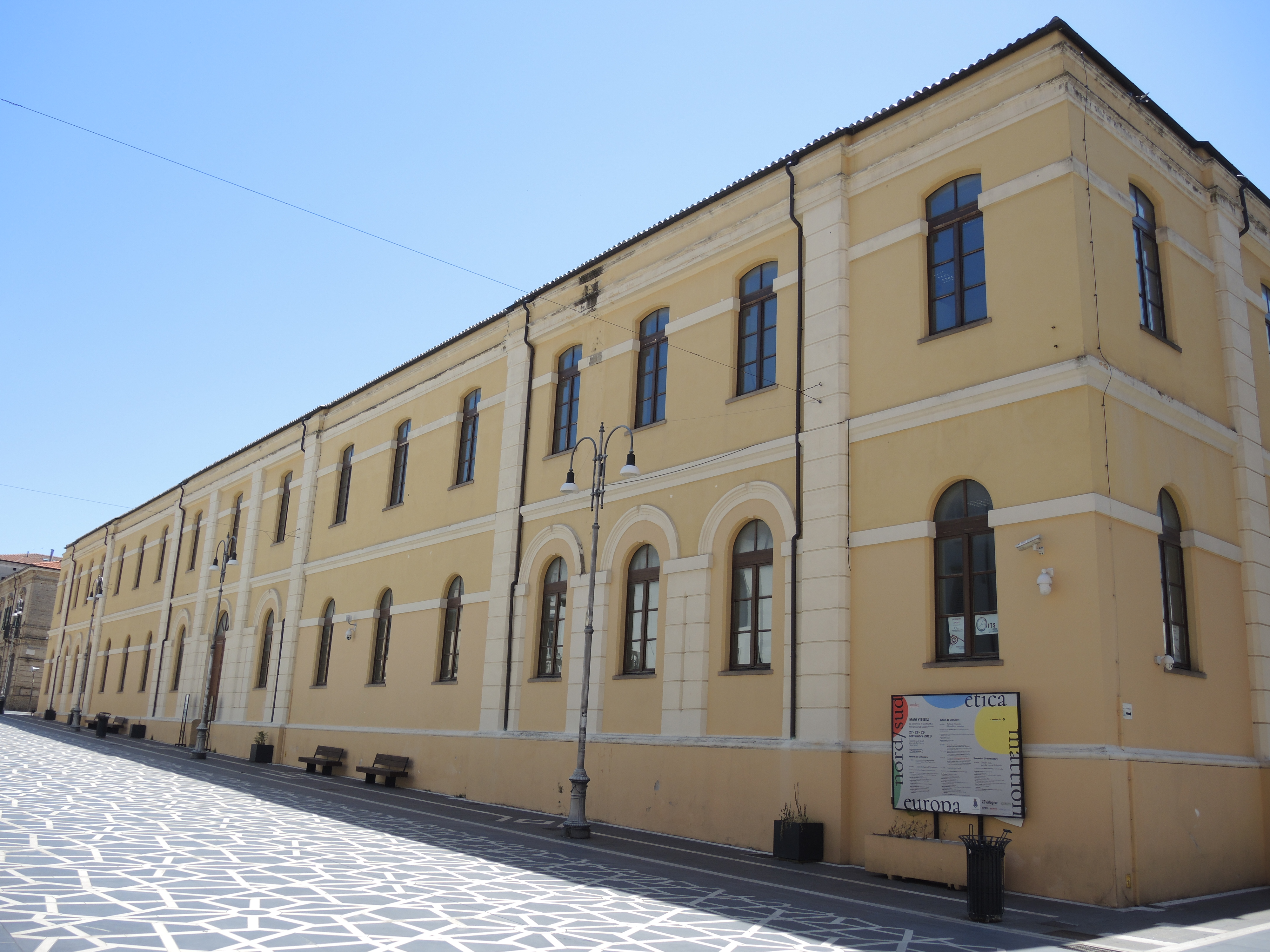 Lanciano